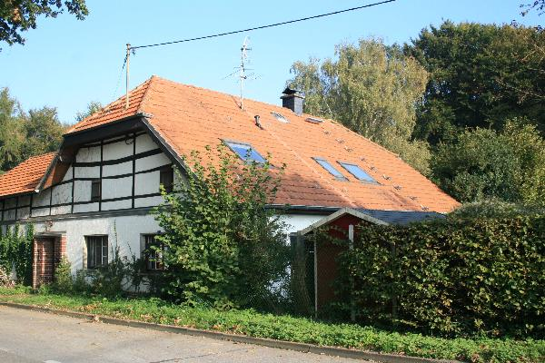 Fachwerkhaus in Wegberg-Ellinghoven